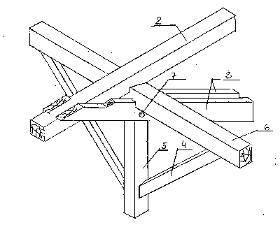 Wiązar płatwiowo-kleszczowy